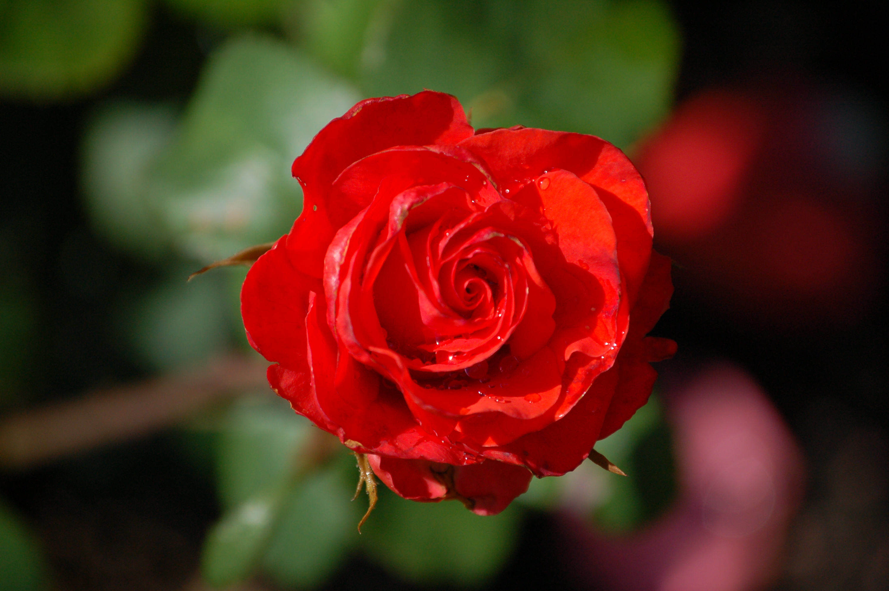 Rosa 'H.C. Andersen'